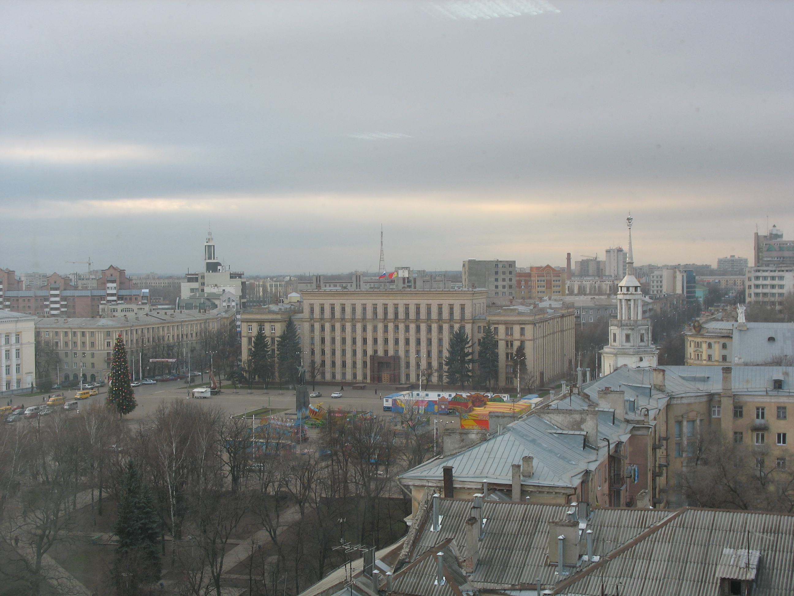 Площадь Ленина Воронеж